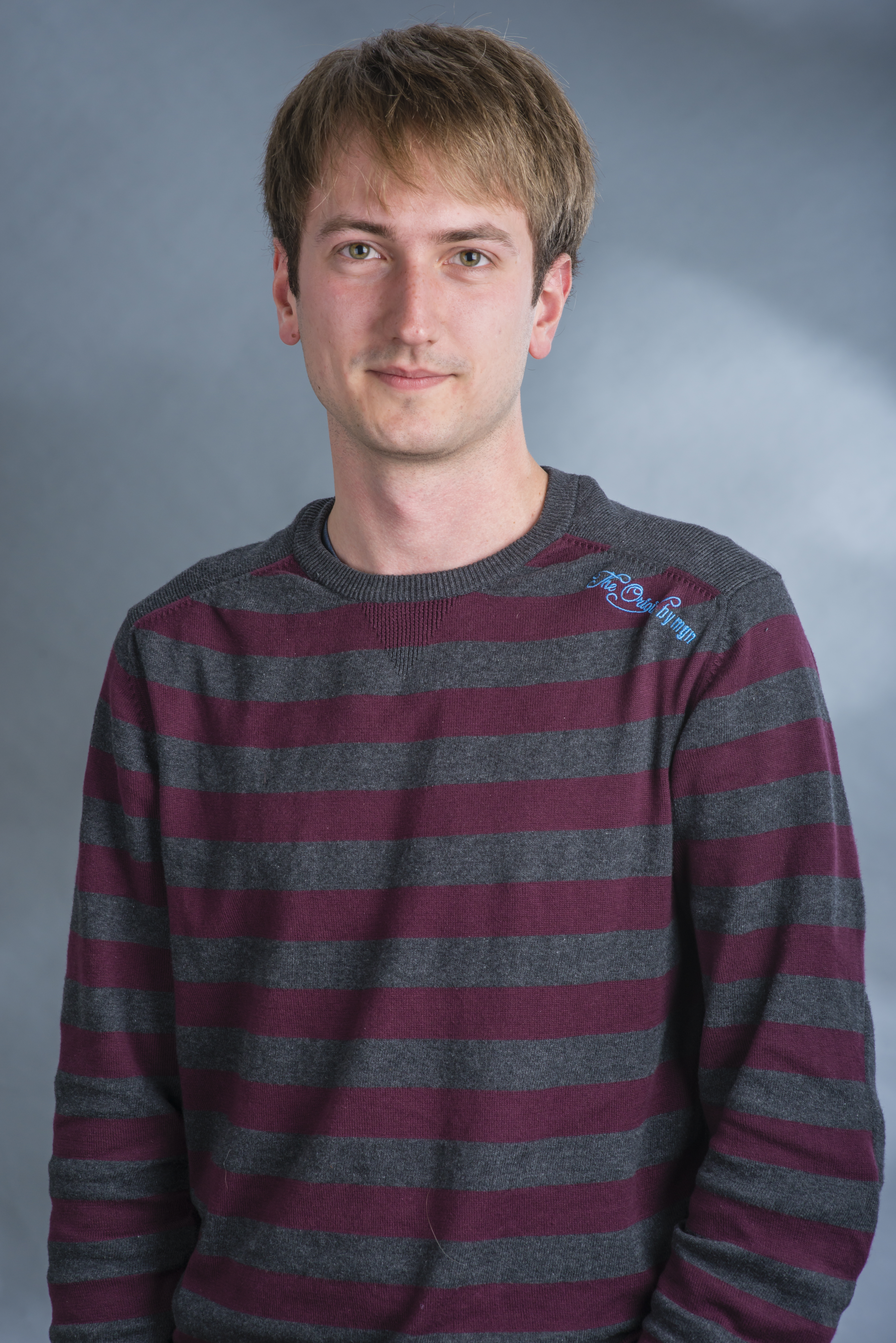 Mitglied der Bremischen Bürgerschaft